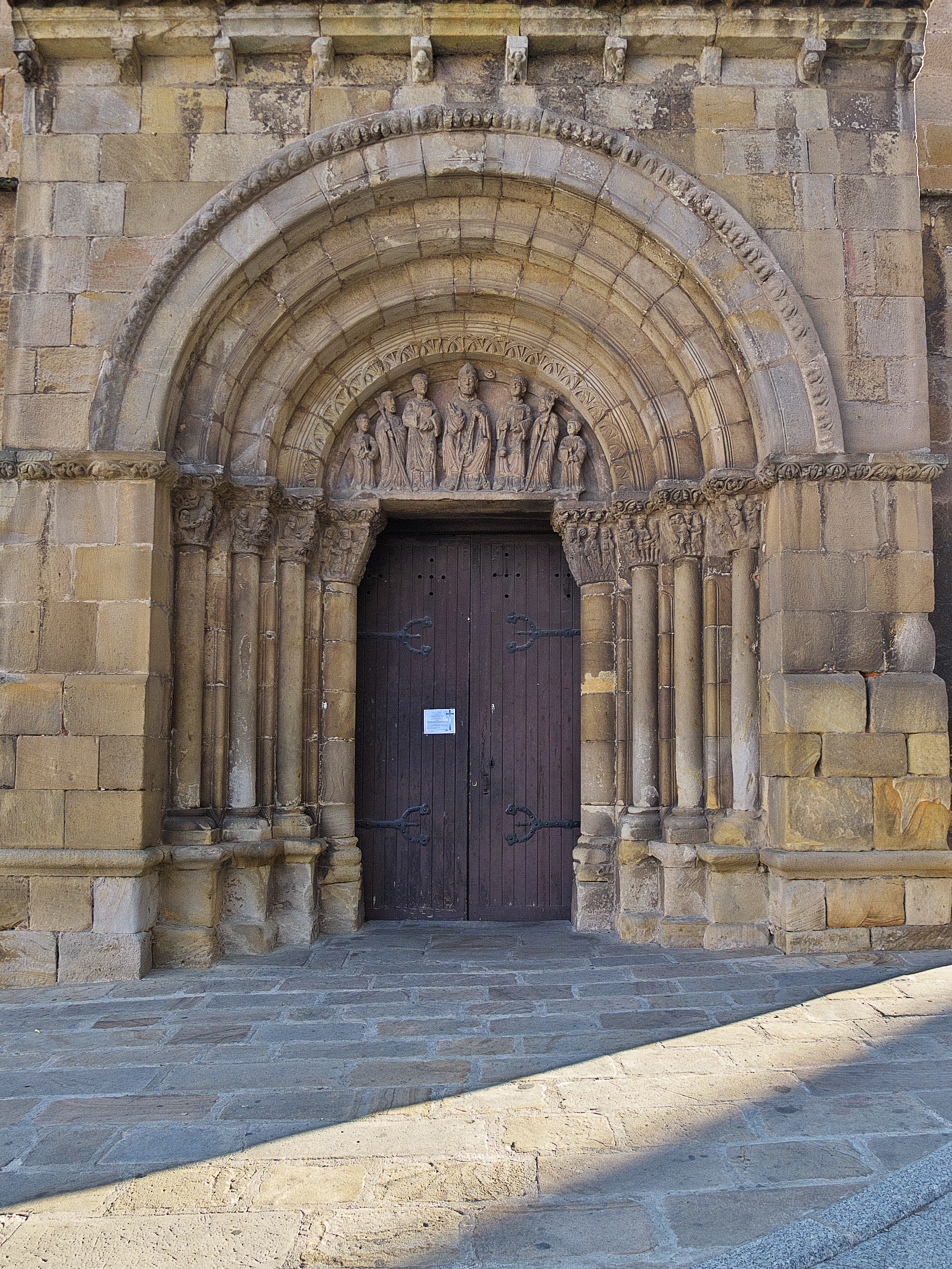 Procedente de la iglesia soriana de San Nicolás. Principios del XIII.